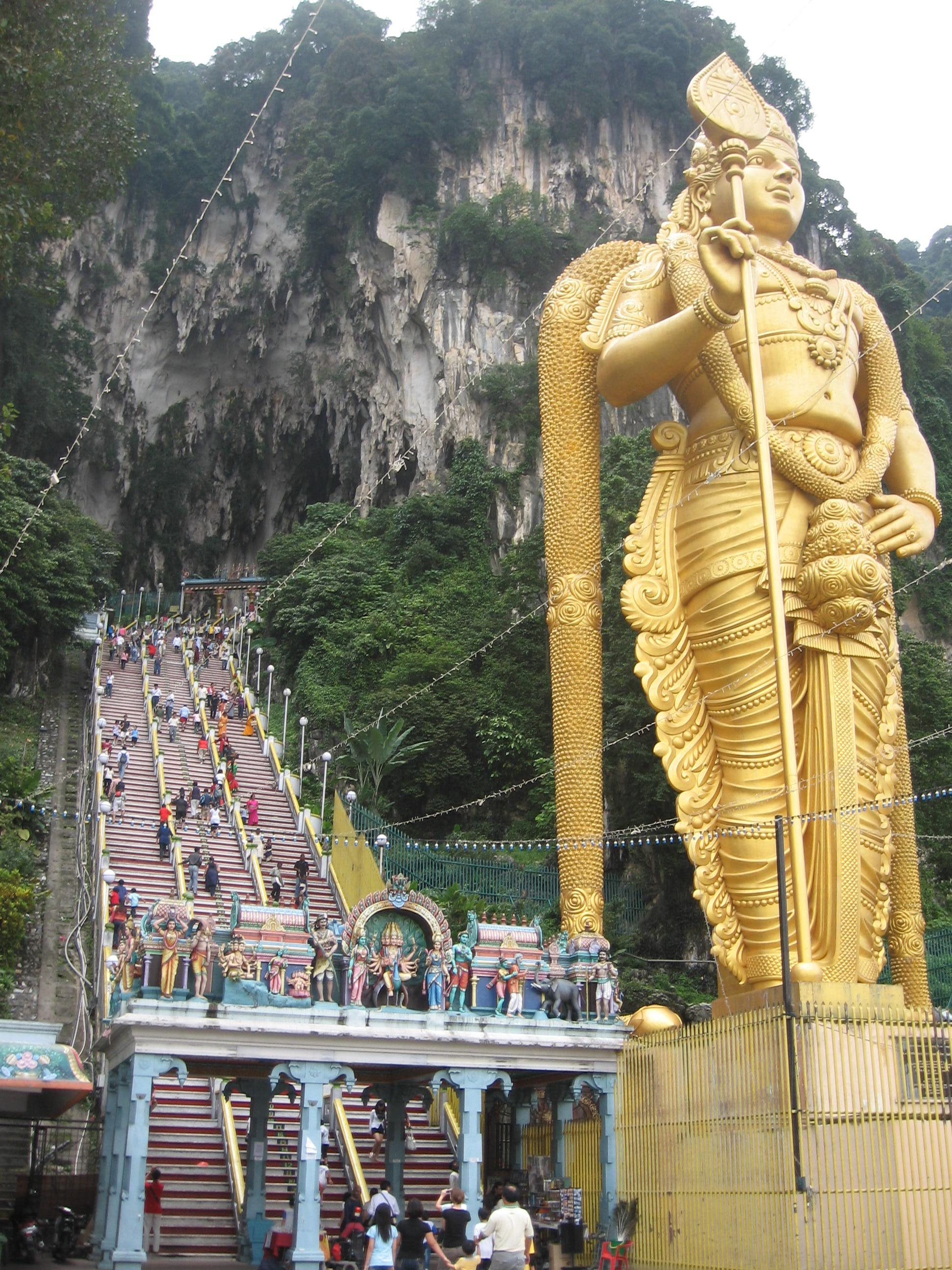 batu caves entrance